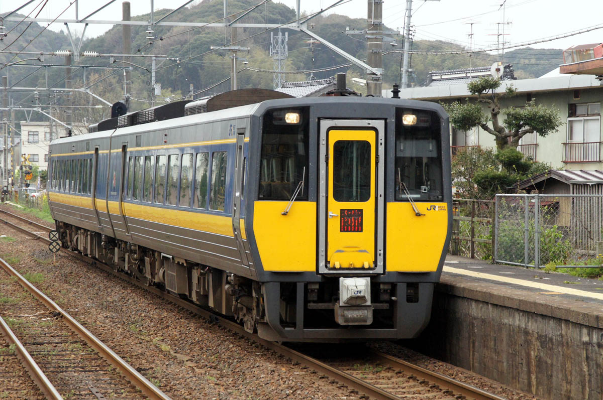 JR西日本 キハ187系（山陰本線、宍道駅）